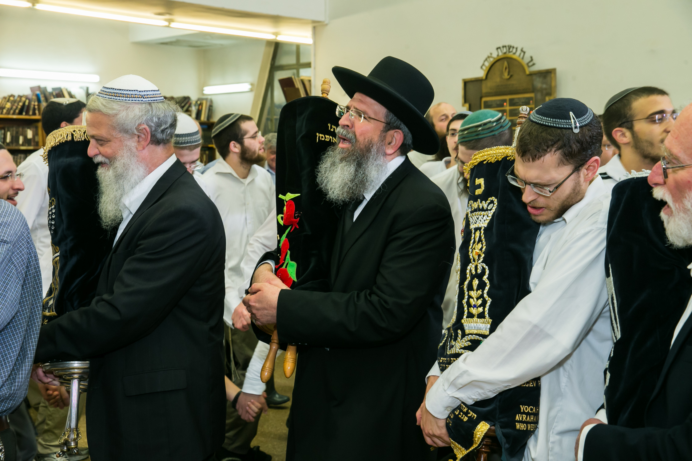 הרב איתמר אורבך (השמאלי) בישיבת מרכז הרב בטקס הכנסת ספר תורה יחד עם הרב יגאל לרר.